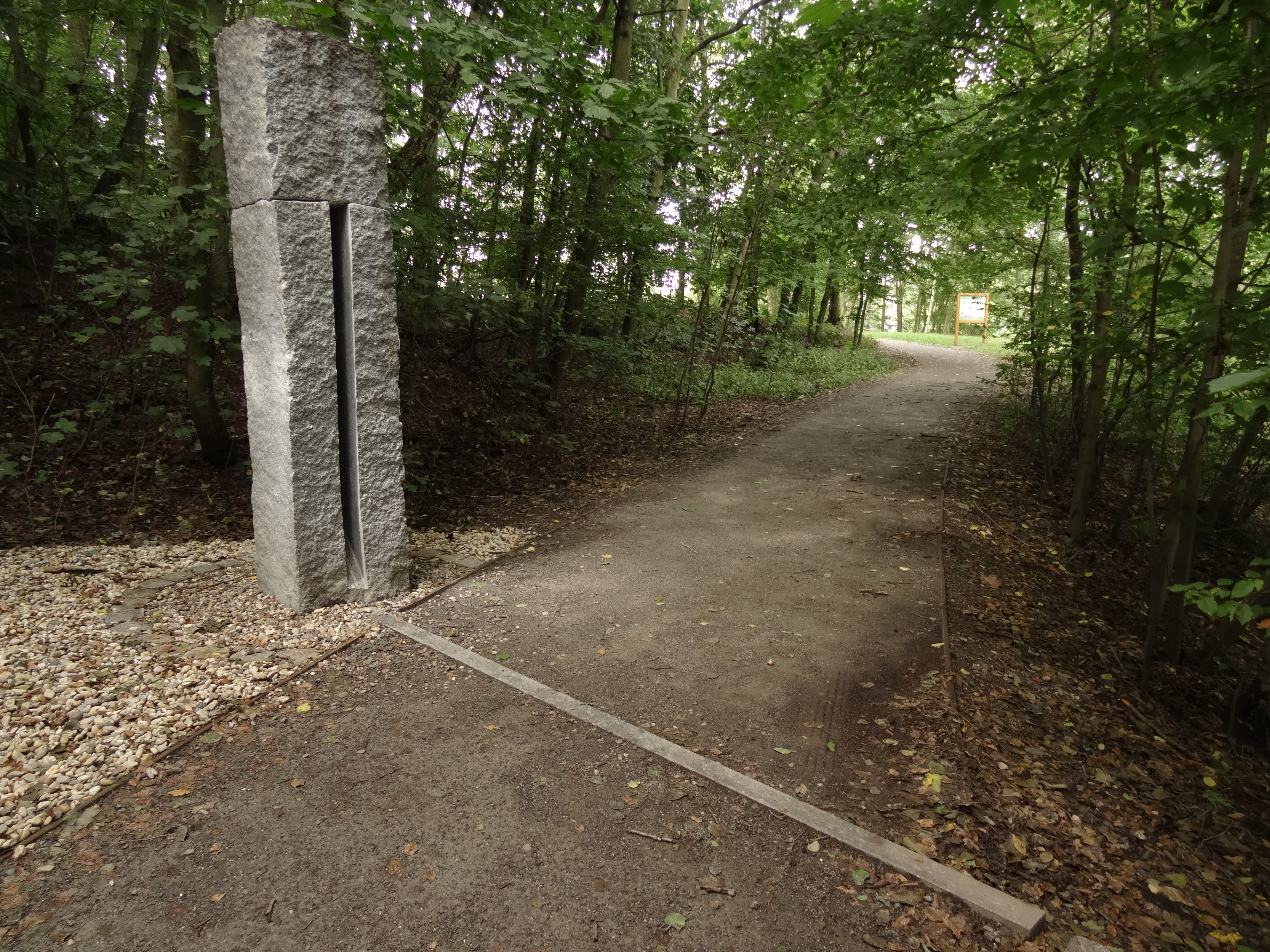 Říčany-Radošovice - obelisk na 50. rovnoběžce u rybníka Jureček